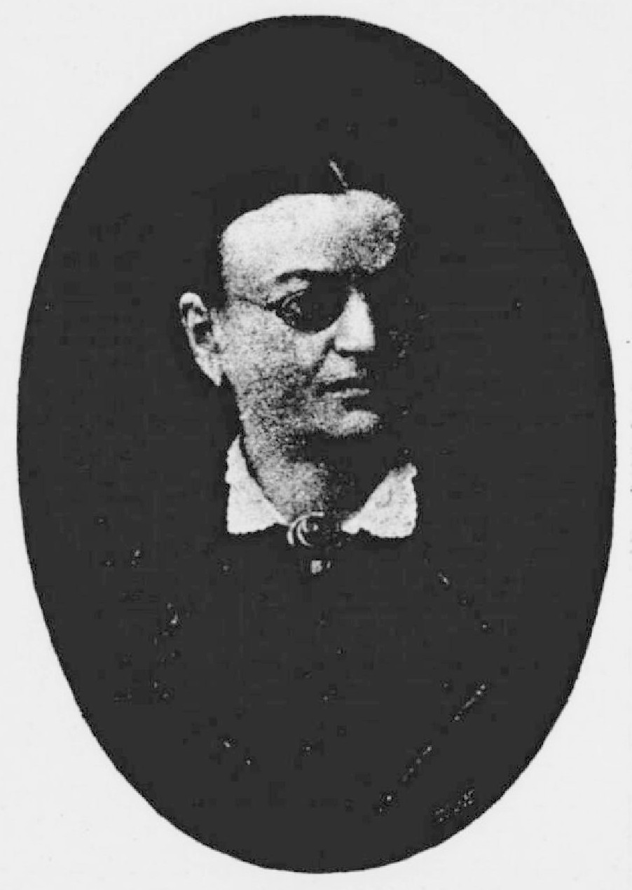 Emilie Fryšová (1840-1920), česká pedagožka, zanícená etnografka a publicistka